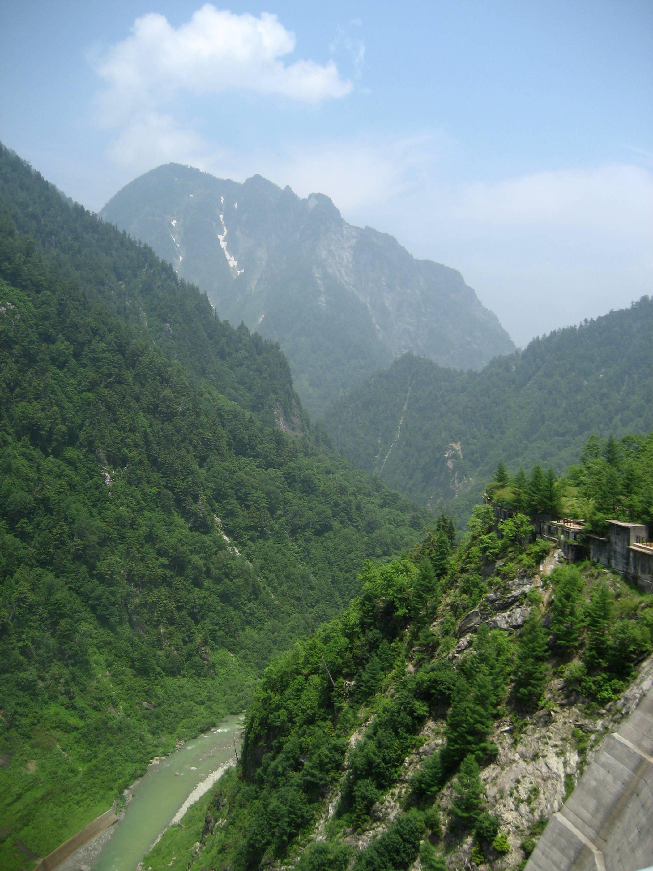 Kurobe kyokoku (黒部峡谷).